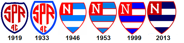 Evolução dos escudos do Nacional Atlético Clube (São Paulo)